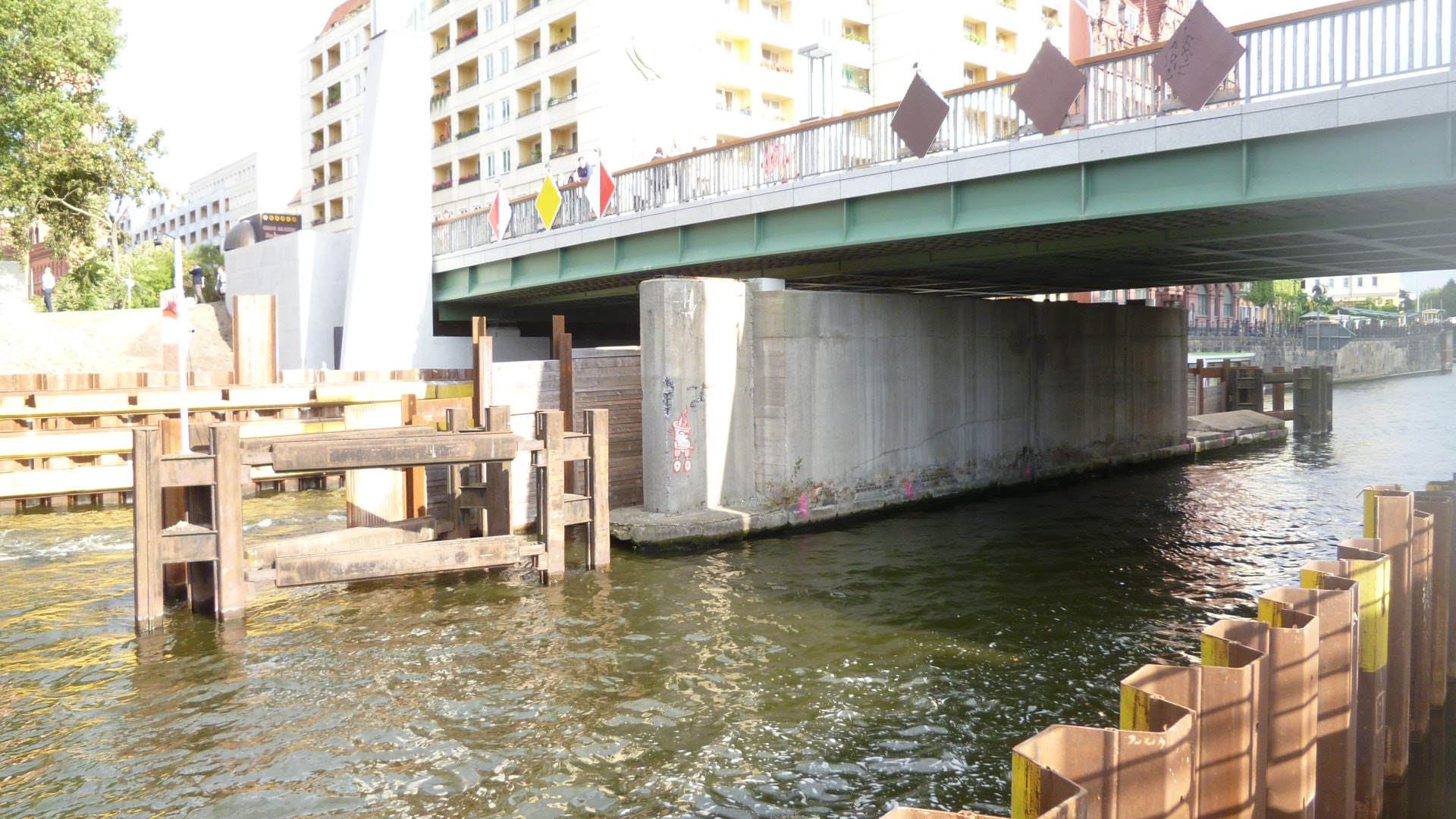 Rathausbrücke mit Mittelpfeiler der Vorgängerbrücke